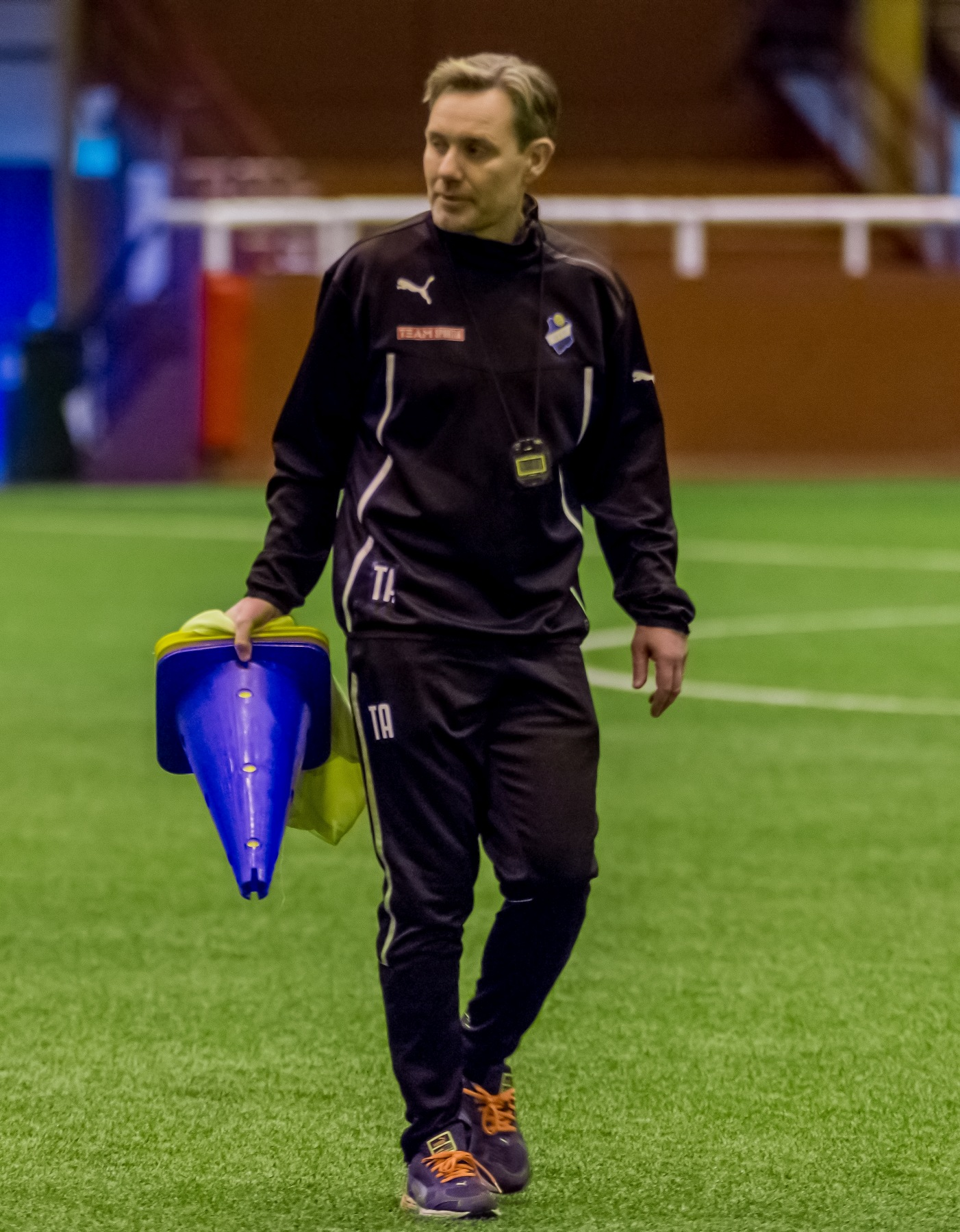 Thomas Askebrand, huvudtränare i Östers IF 2015, i Växjö Tipshall första dagen i träning inför Division Ett Södra 2015